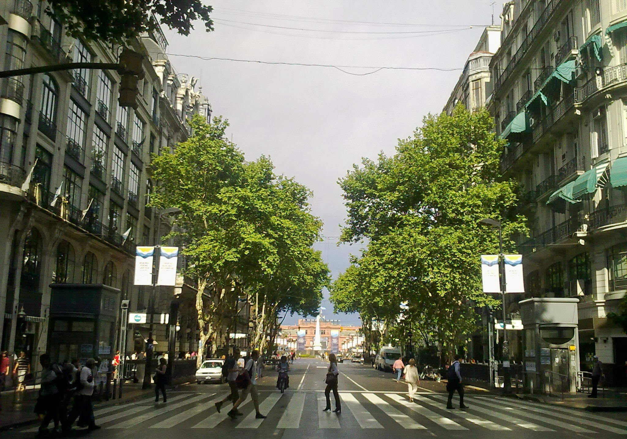 Avenida de mayo, vista desde la intersección con la calle Perú (peatonal) hacia el Este, Buenos Aires, Argentina. A izquierda y derecha se aprecia tanto el ascensor como la escalera de entrada a la estación Perú del Subte de la línea A. Al fondo al centro se observa la Plaza de Mayo, con la Pirámide de Mayo, y más atrás la Casa Rosada. Las pancartas circunstanciales que cuelgan tienen el logo del festejo del bicentenario de la Revolución de mayo.Este lugar pertenece al barrio porteño de Monserrat.